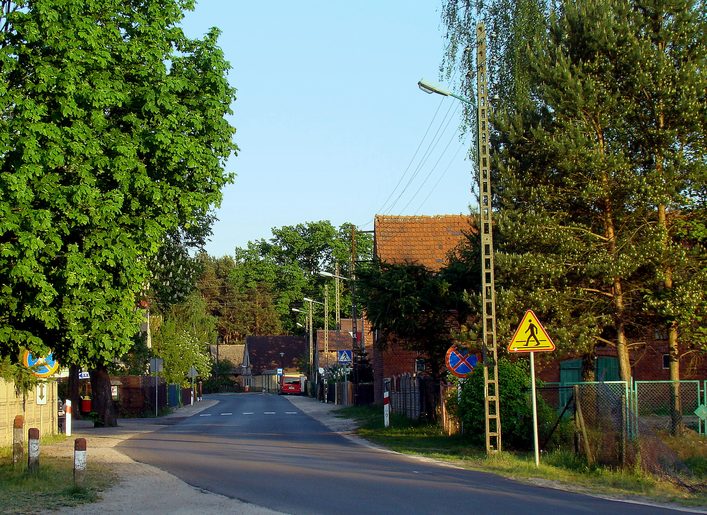 Lubiatów, (Gmina Sława, powiat wschowski, województwo lubuskie), Polska